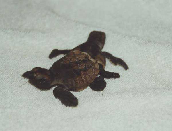 Bébé Tortue imbriquée